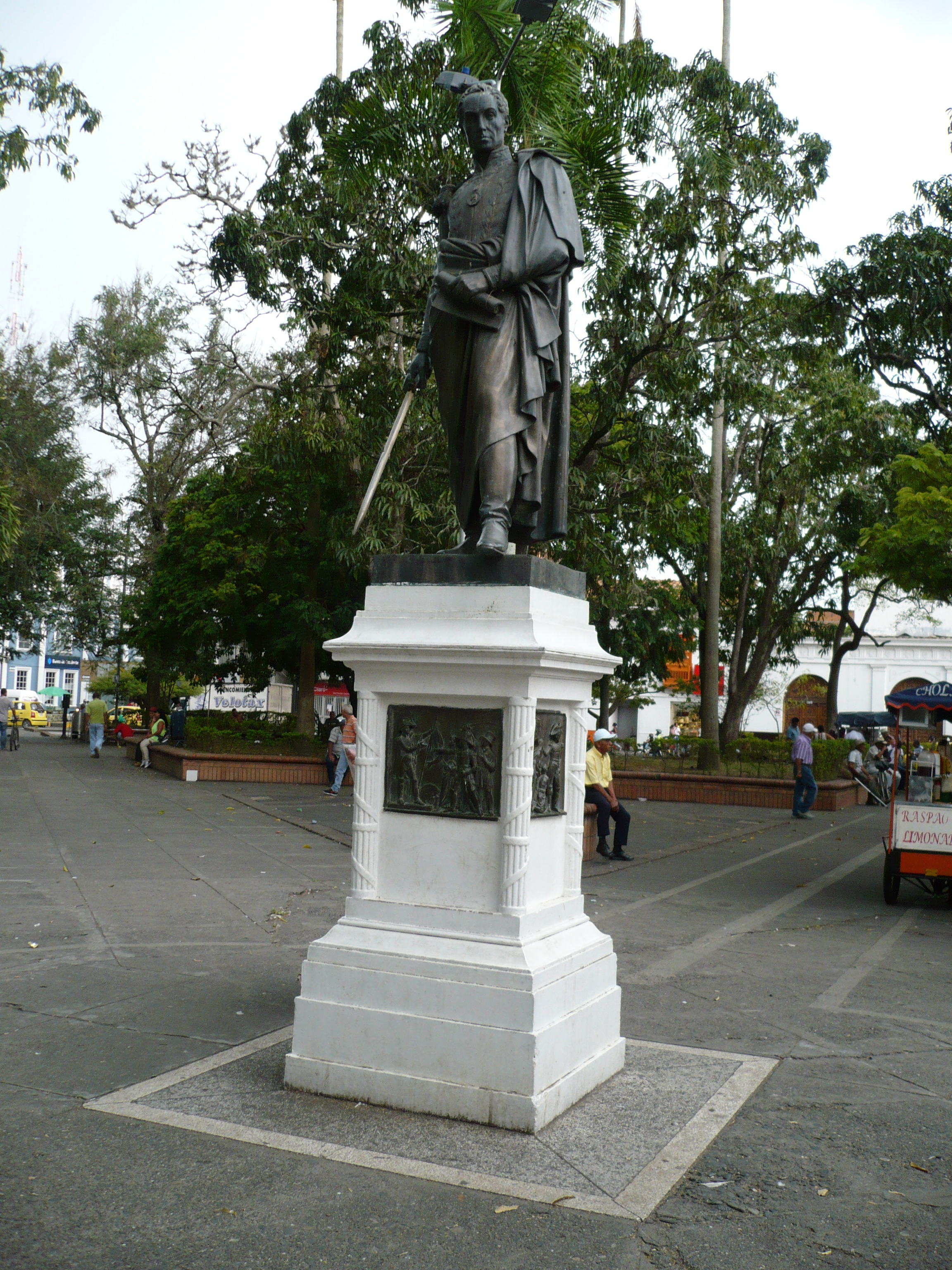 Monumento al Libertador Simón Bolívar en el Parque de Bolívar. Cartago, Valle, Colombia.